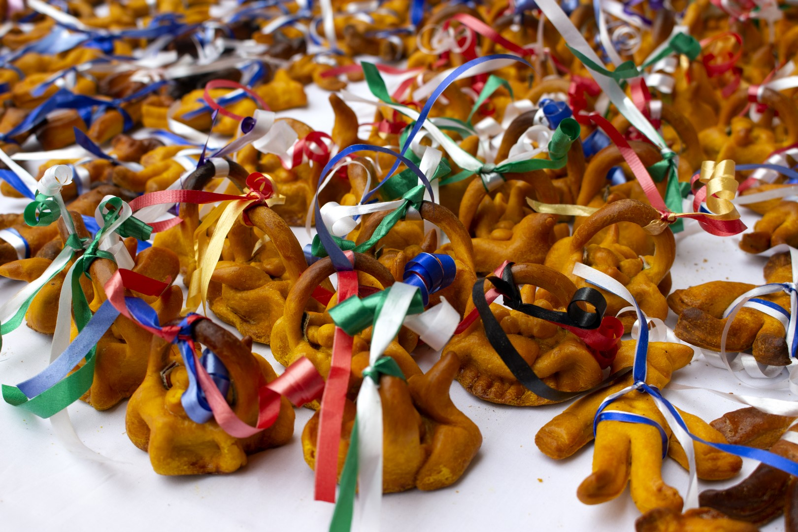 Las paxarinas son un amuleto contra las tormentas. Se adquieren el día de San Mateo, y aseguran protección hasta la siguiente festividad del santo.